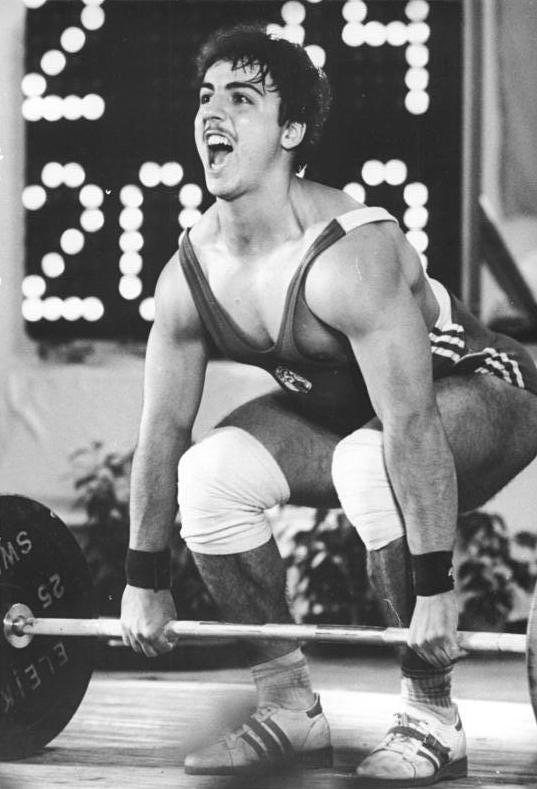 Ingo Steinhöfel ADN-ZB Thieme 24.06.1989 Karl-Marx-Stadt: DDR-Meisterschaften im Gewichtheben-Leichtschwergewichtler und Lokalmatador Ingo Steinhöfel schaffte im Reißen 165 kg und im Olympischen Zweikampf 365 kg (beides neue DDR-Rekorde) .Er verbesserte die eigene Rekordleistung im Reißen und die von Joachim Kunz im Zweikampf um jeweils 2,5 kg.